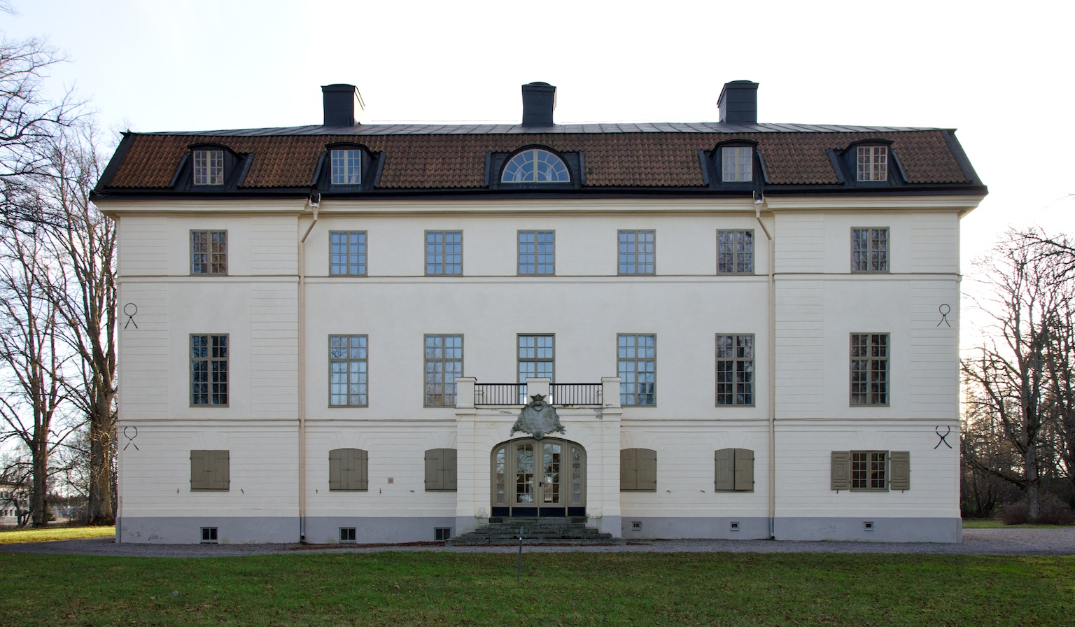 Baksidan av Granhammars slott, Upplands-Bro, Sverige.